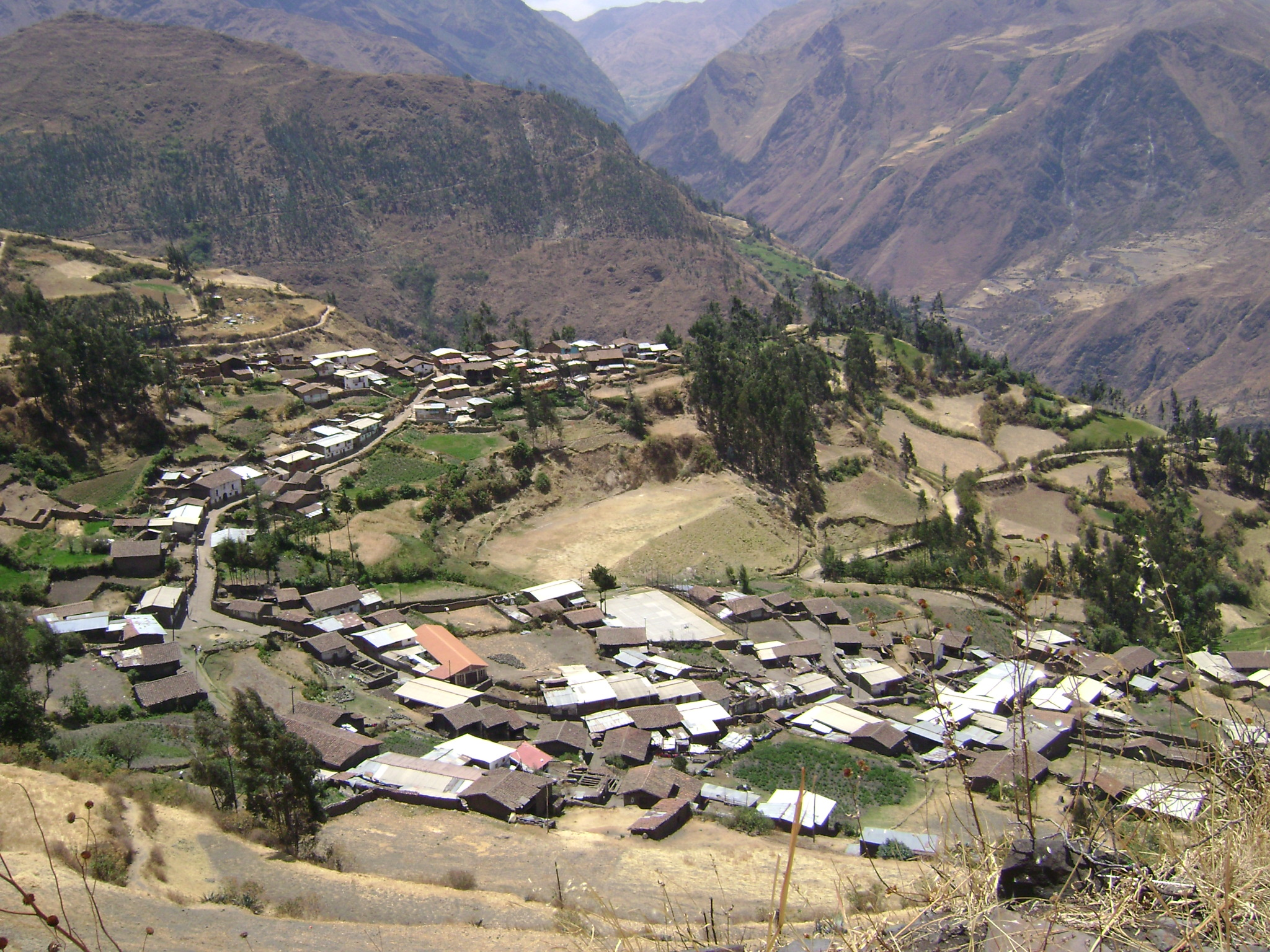 DISTRITO DE CUSCA CORONGO ANCASH PERU